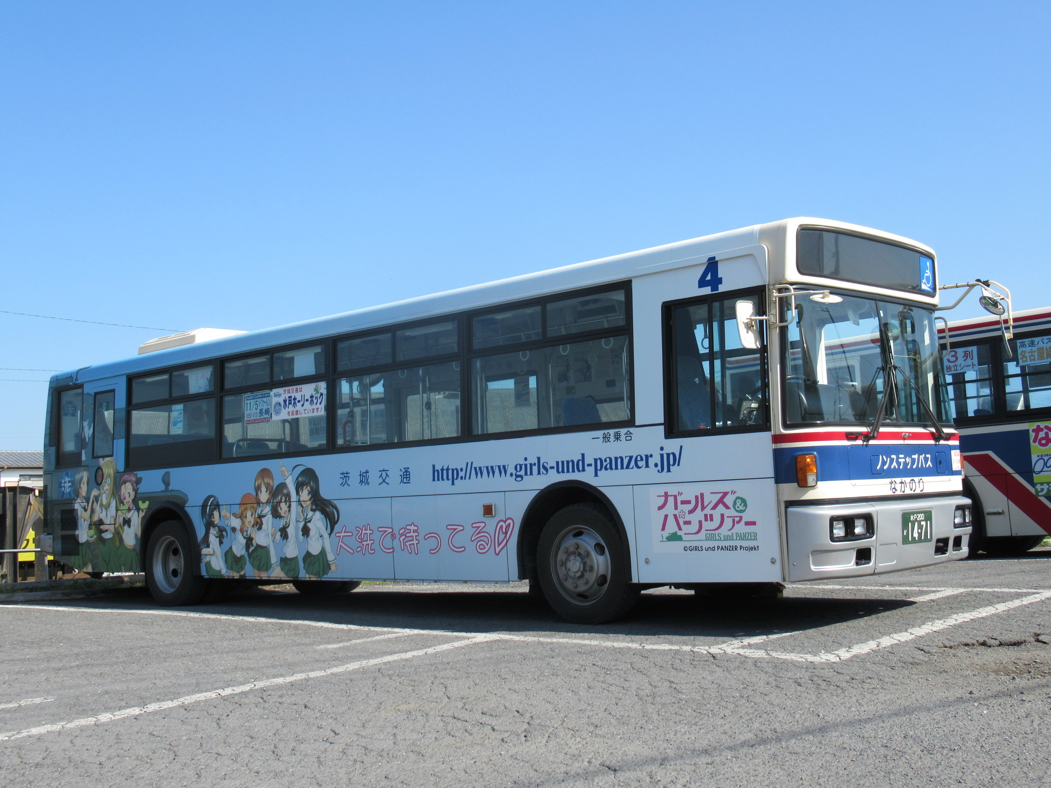 茨城交通 ガールズ＆パンツァーラッピングバス 4号車 那珂湊営業所